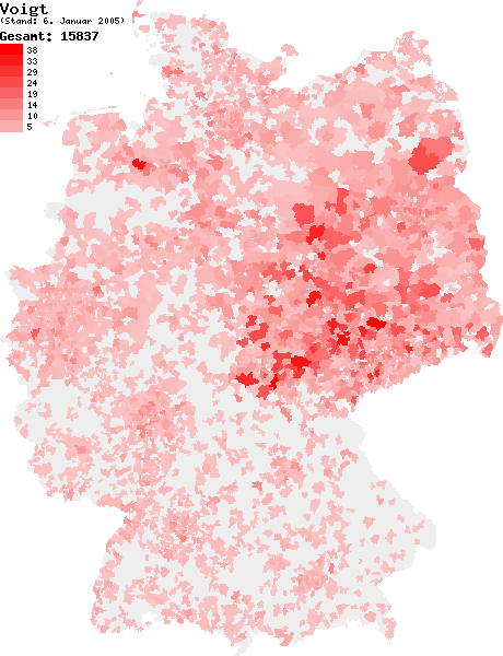 Verteilung des Nachnamens Voigt in Deutschland nach dem Telefonbuch mit Stand vom 6. Januar 2005